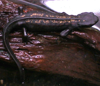 Cynops ensicauda popei